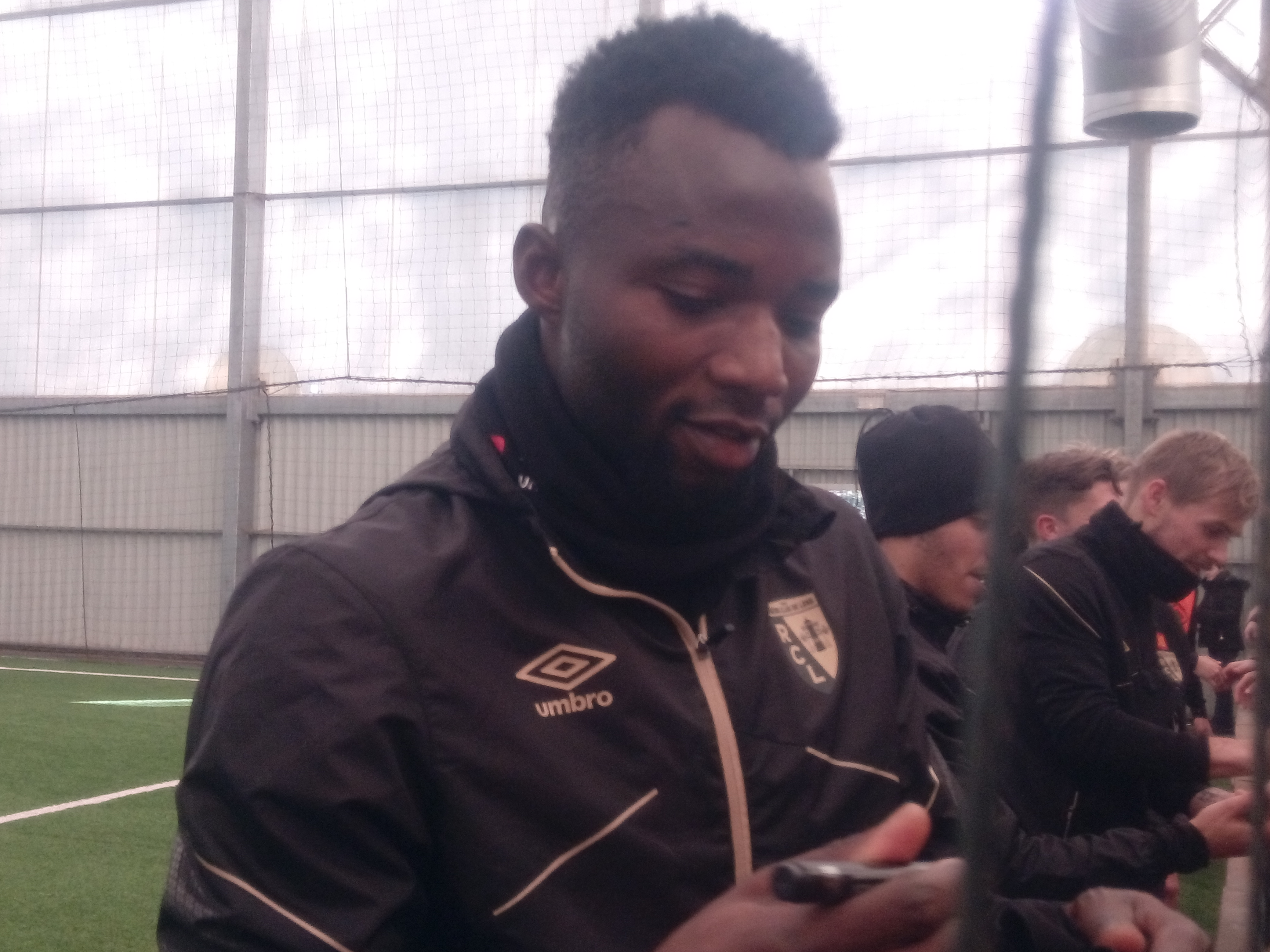 Djiman Koukou lors d'un entraînement public du Racing Club de Lens, au Centre Technique et Sportif de La Gaillette, à Avion, le 6 janvier 2017.